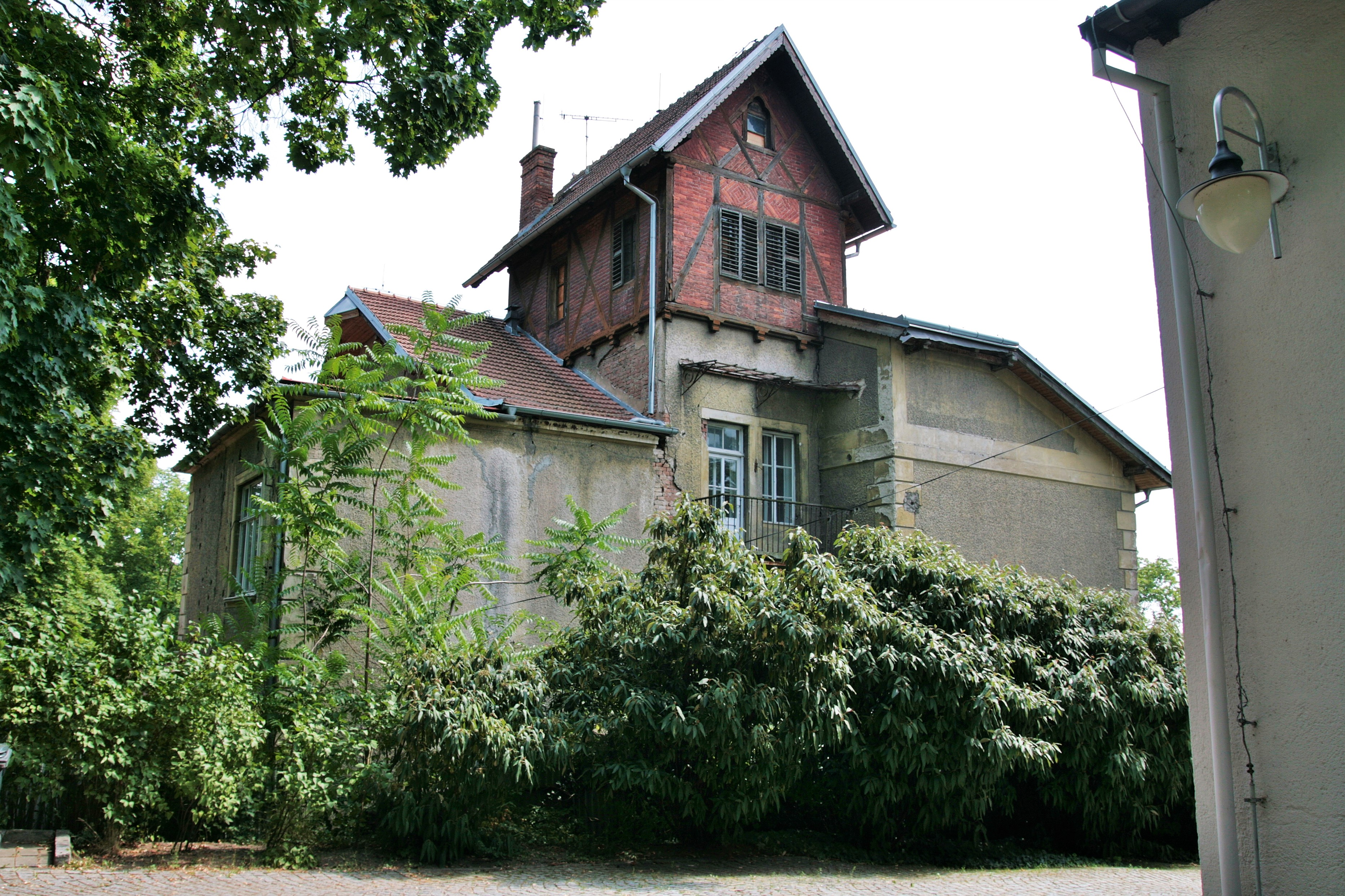 Arnoldova vila v Drobného ulici č. o. 26 v Brně-Černých Polích. Celkový pohled od severozápadu od budovy Ústavu geoniky AV ČR (Drobného 28).